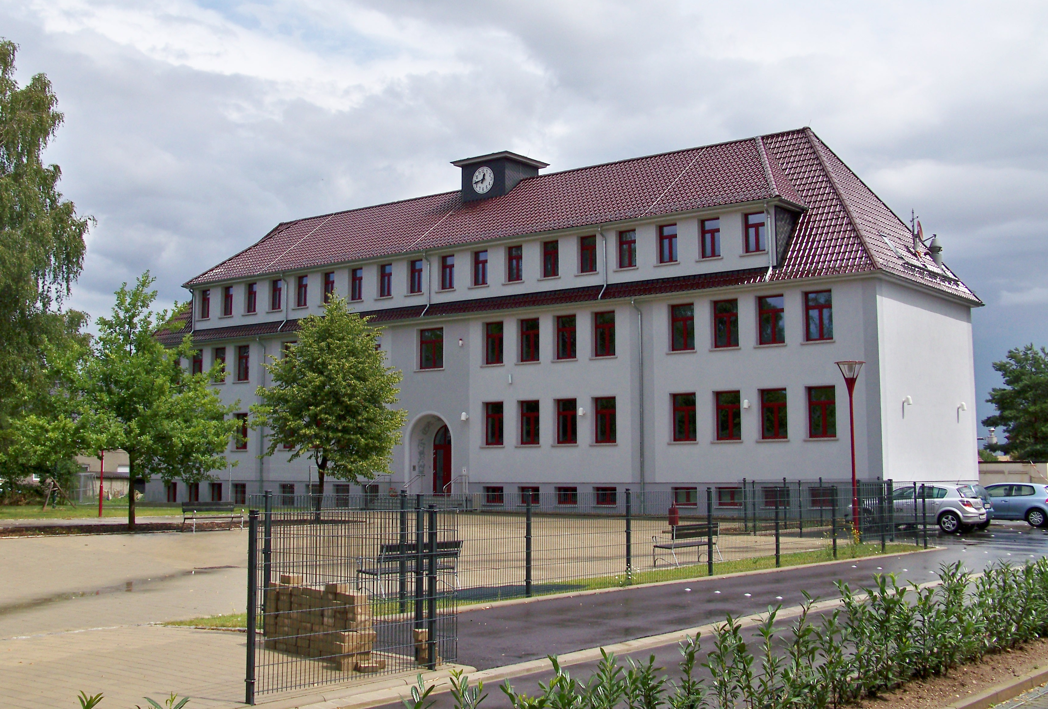 Private Allgemeinbildende Schulen in Großkorbetha